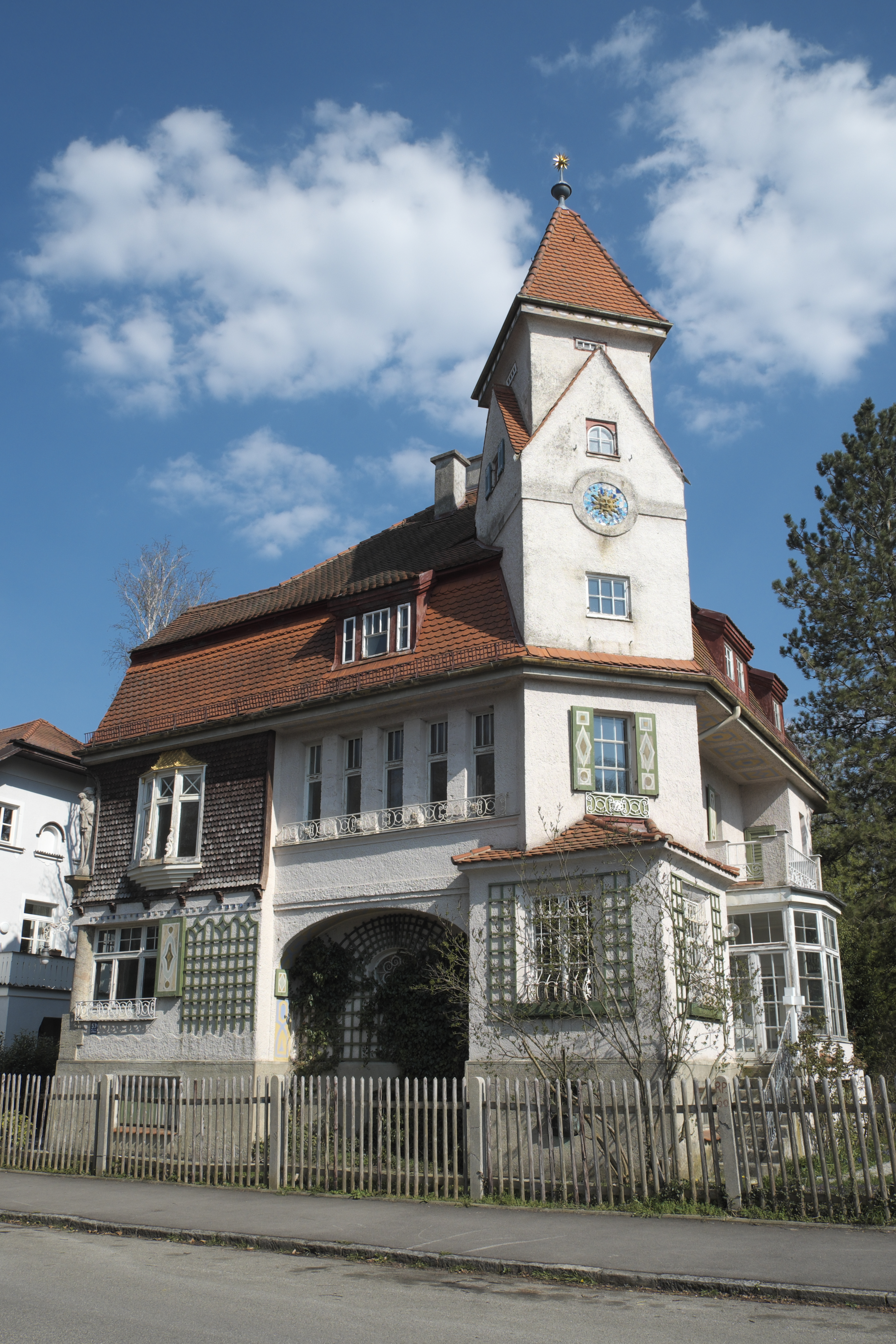 Villa, Am Stadtpark 53, in Pasing im Stadtbezirk Pasing-Obermenzing (Bayern, Deutschland), 1909 von Josef Schormüller erbaut